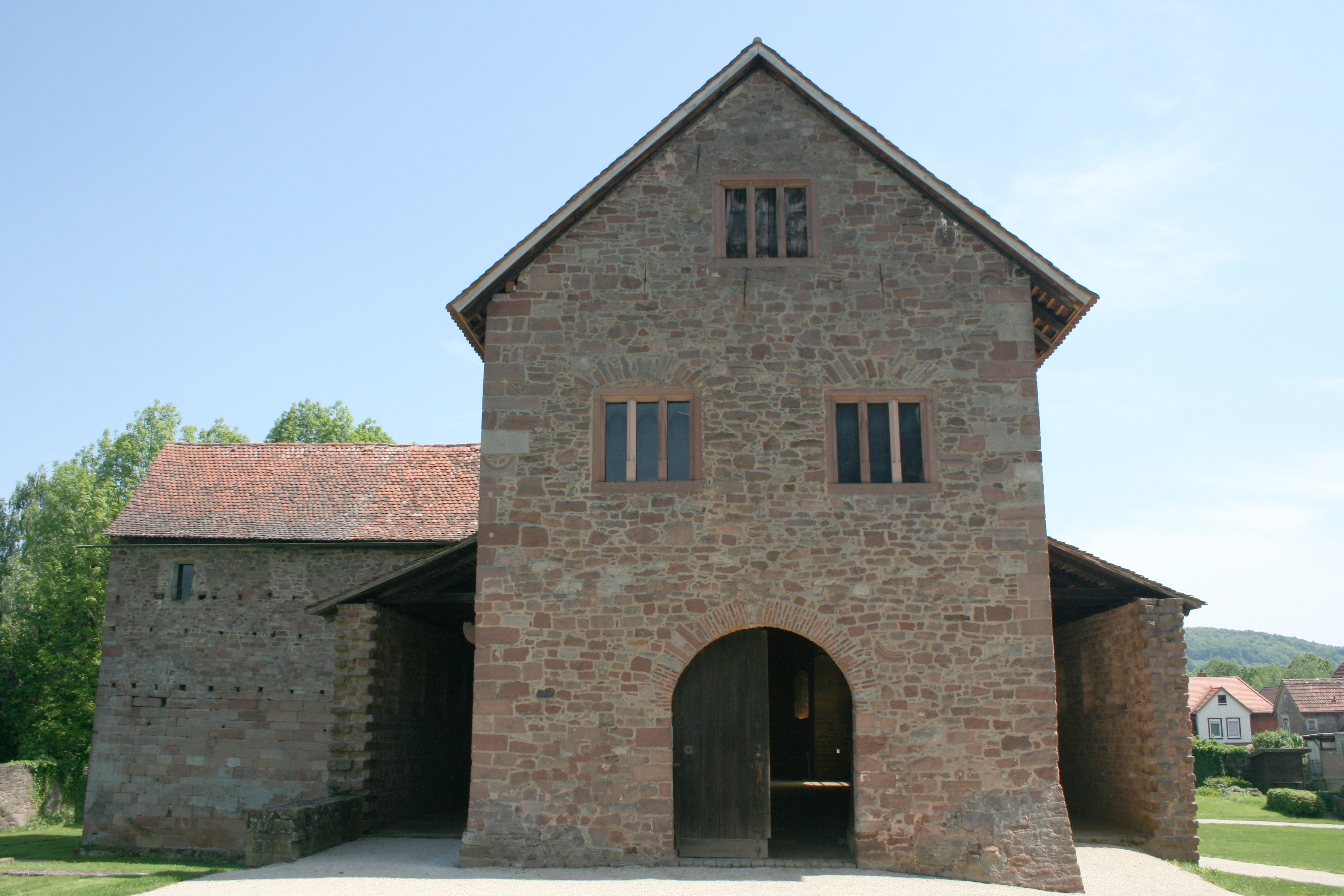 Ansicht der Steinbacher Basilika von Westen 2012.